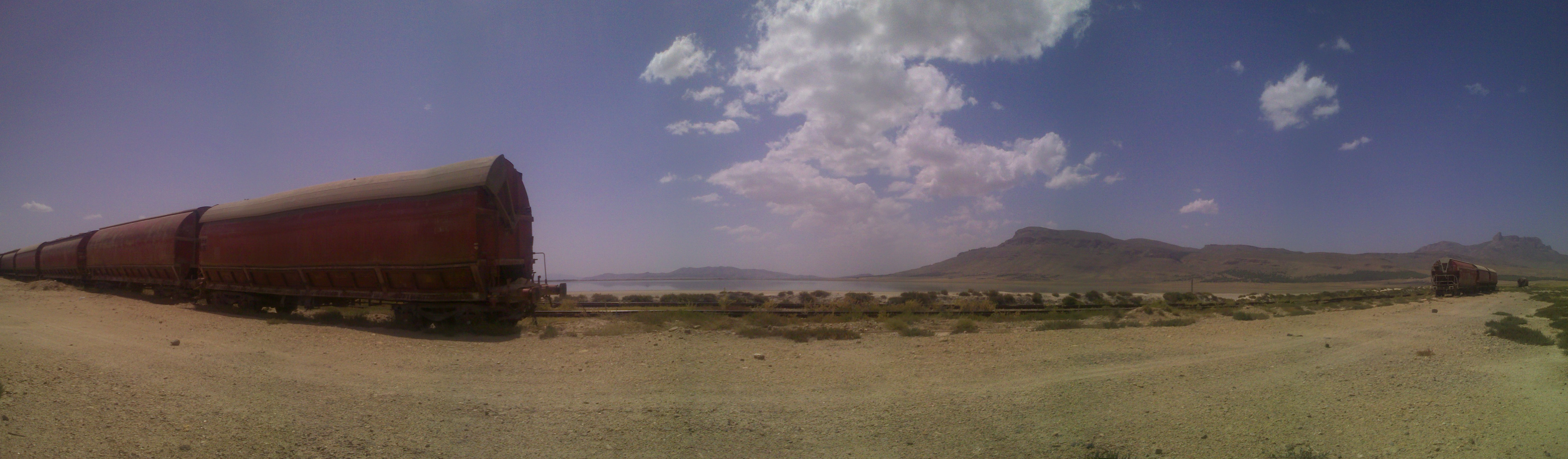 Le Sebkhet El Zemoul, est un lac du nord est de l’Algerie a Oum-El-Bouaghi dans la commune Ouled Zouaï